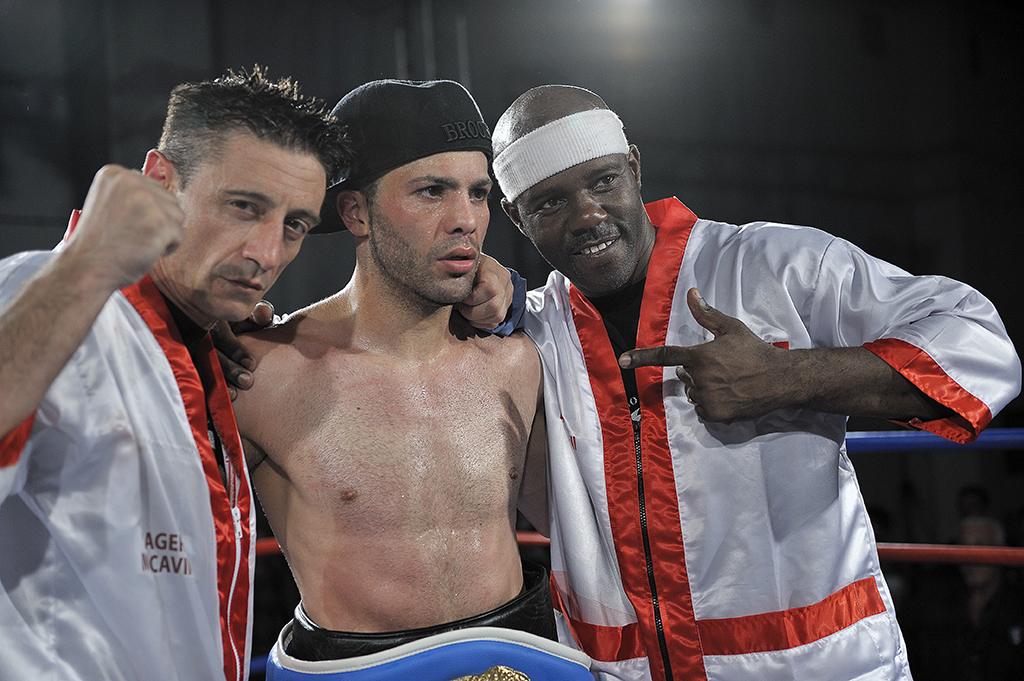 Floriano Pagliara con i suoi allenatori: Andrea Galbiati e Don Saxby